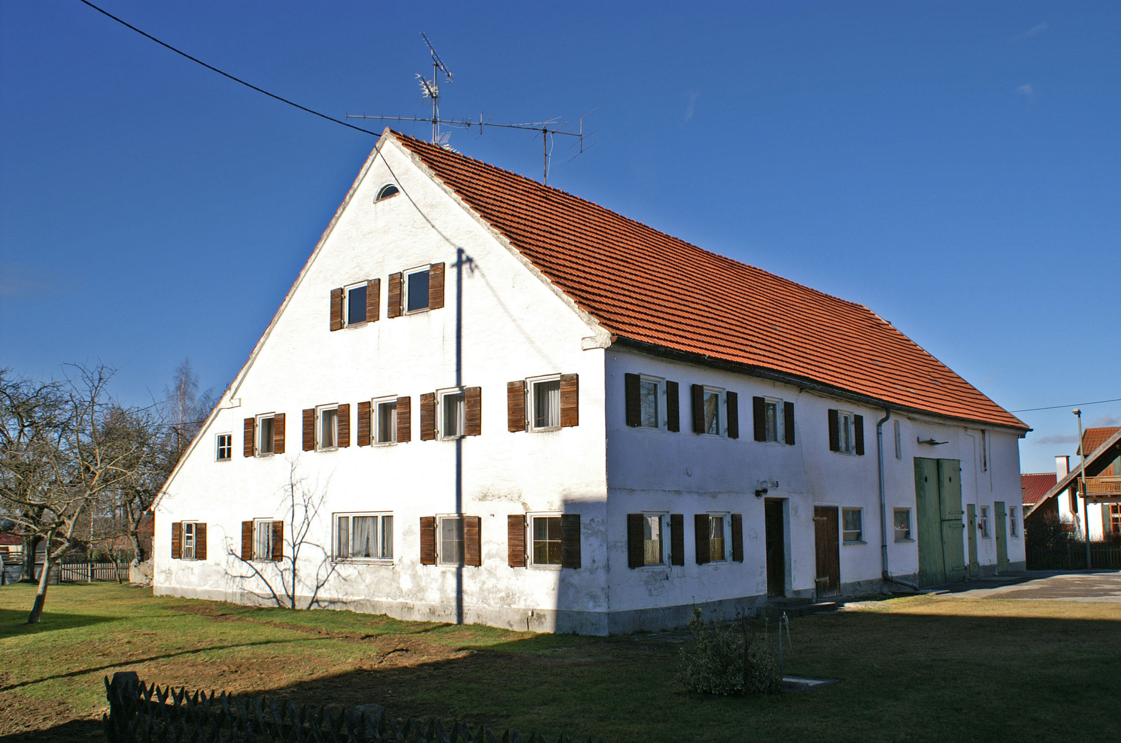 Bauernhof in Hausen, Buchloe